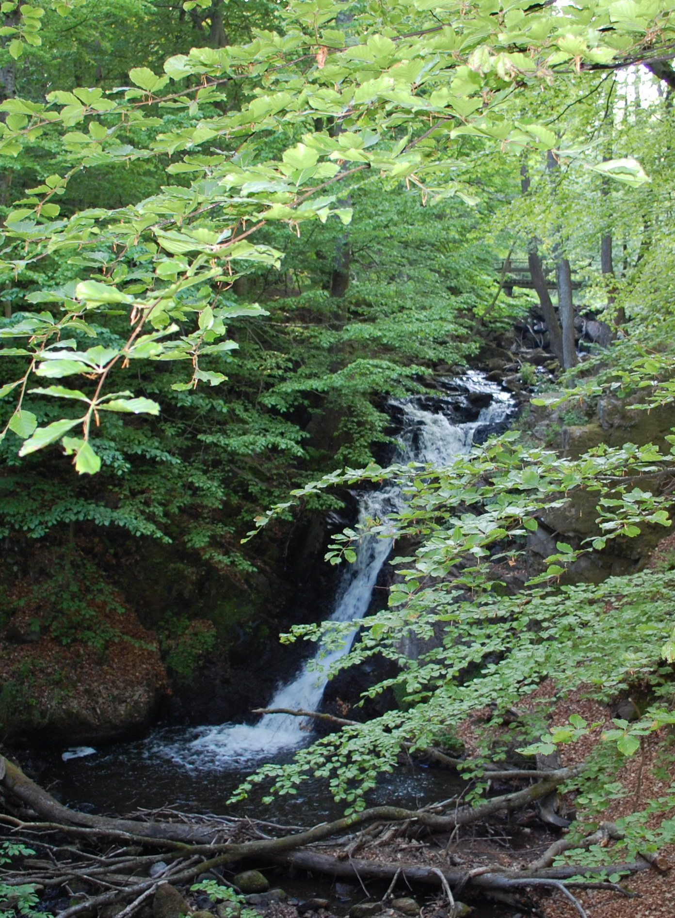 Forsaker, oberer Wasserfall